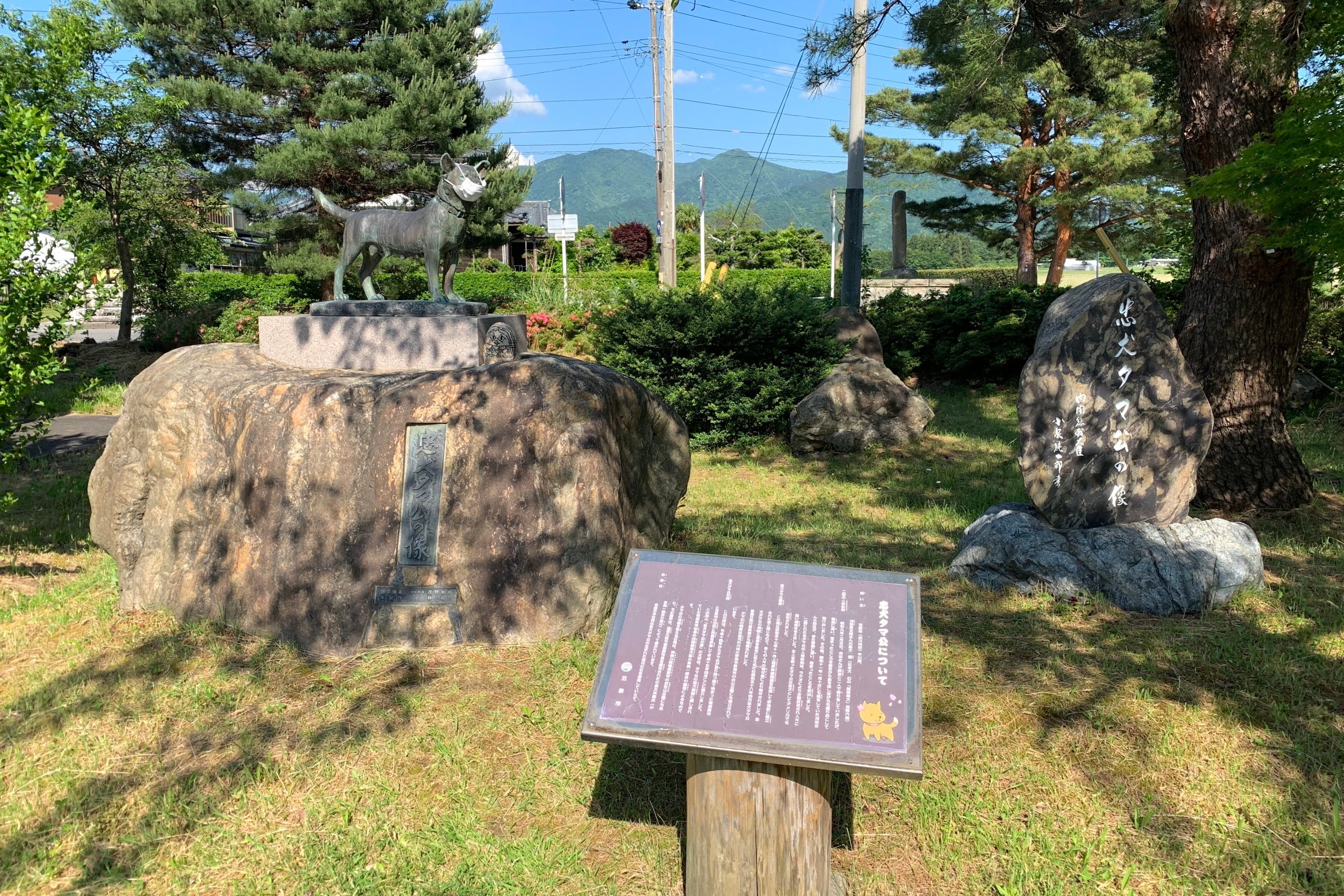 村松公園の忠犬タマ公像（2020年5月）新型コロナウイルス感染症への警戒呼びかけのためマスク姿になっている。